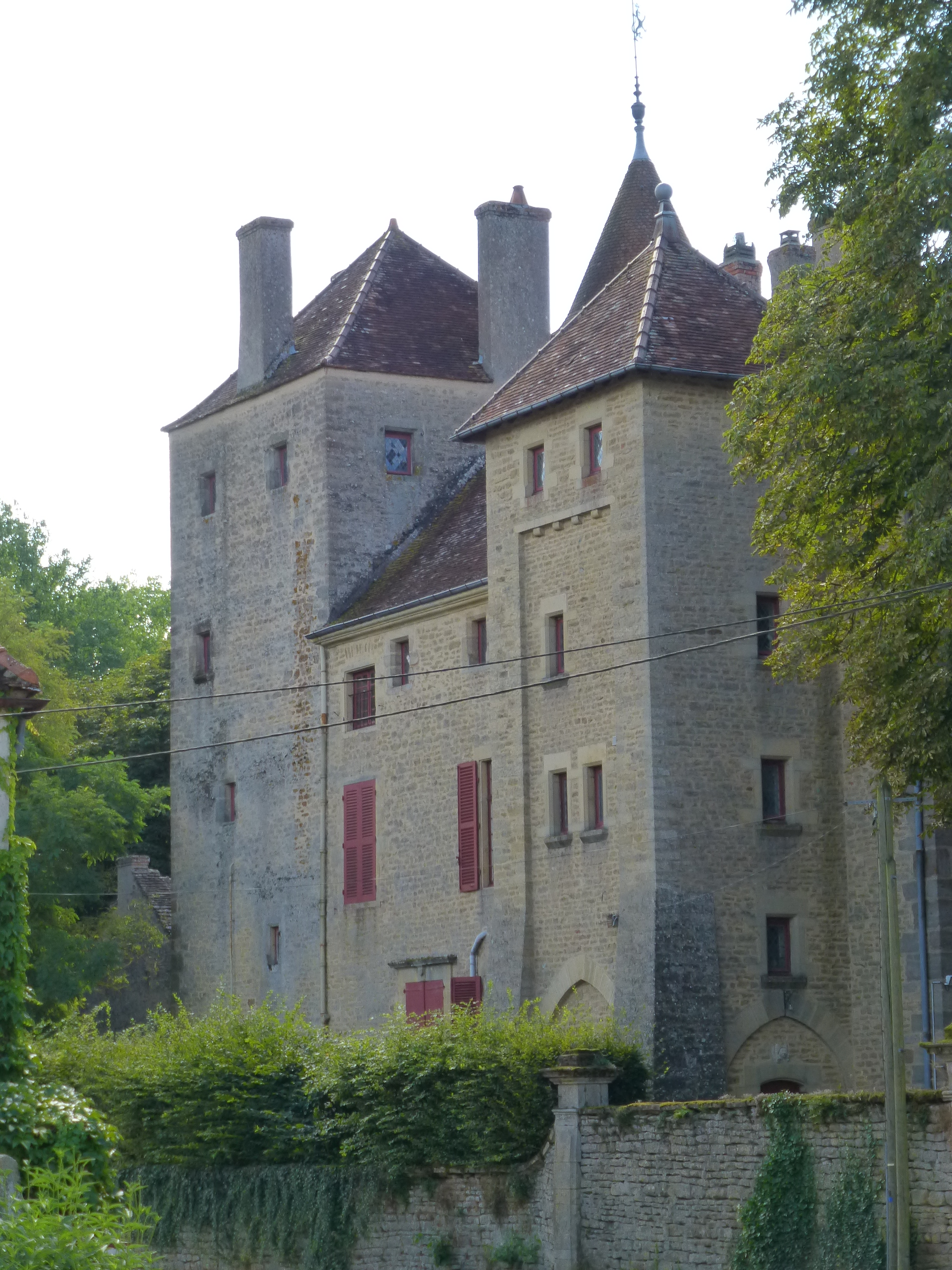 Château de Joncy (71) , vu du village.